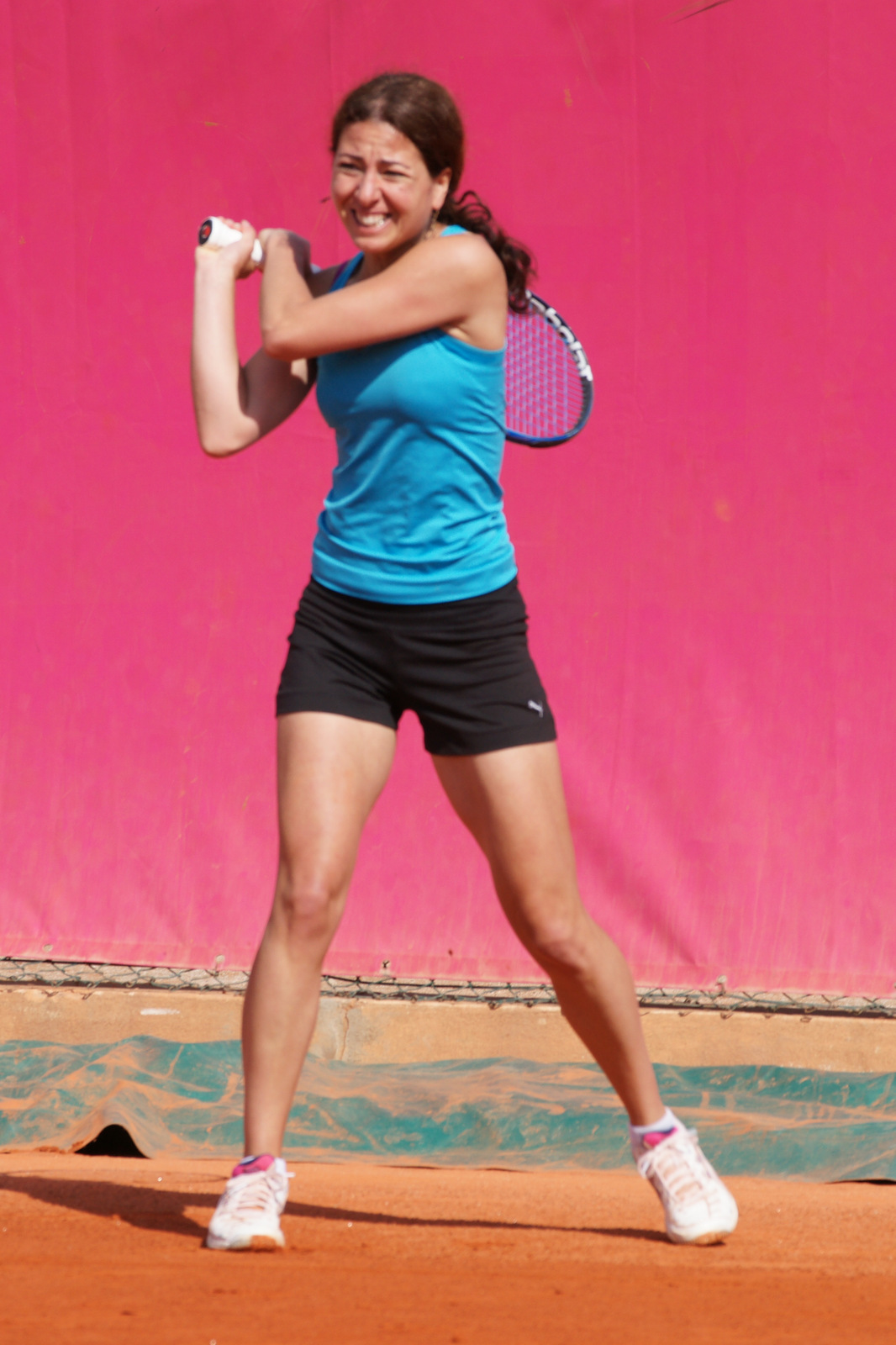 Margalita Chakhnashvili Cagnes 2012.JPG